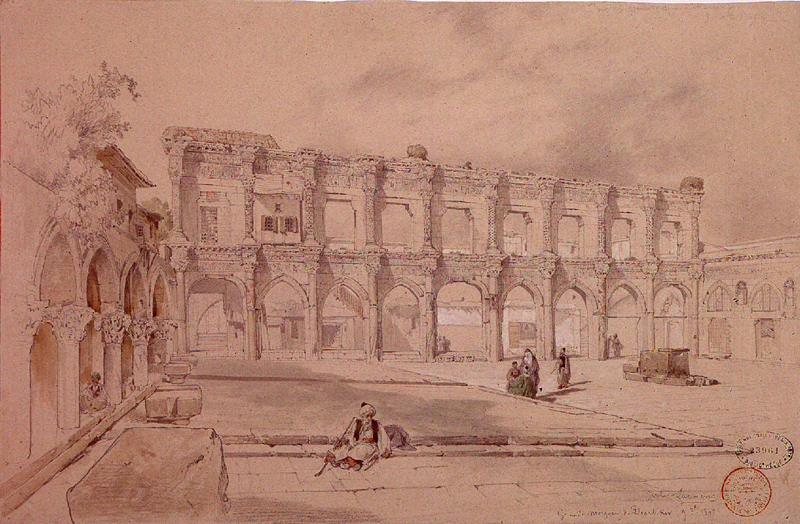 Anatolie de l'est: la grande mosquée de Dyarbakir. Crayon et aquarelle sur papier bistré.